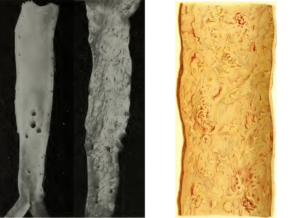 Aspetto macroscopico dell'aterosclerosi dell'aorta addominale. Le immagini sono tratte da: Louis M. Warfield. Arteriosclerosis. 1913; Otto Bollinger. Atlas and essential of pathologic anatomy vol.1. 1898.